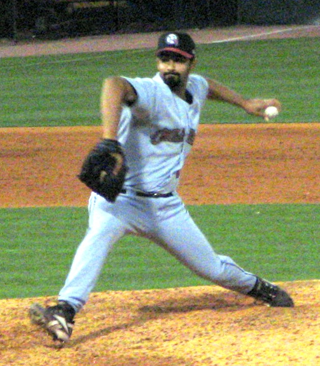 Erasmo Ramirez